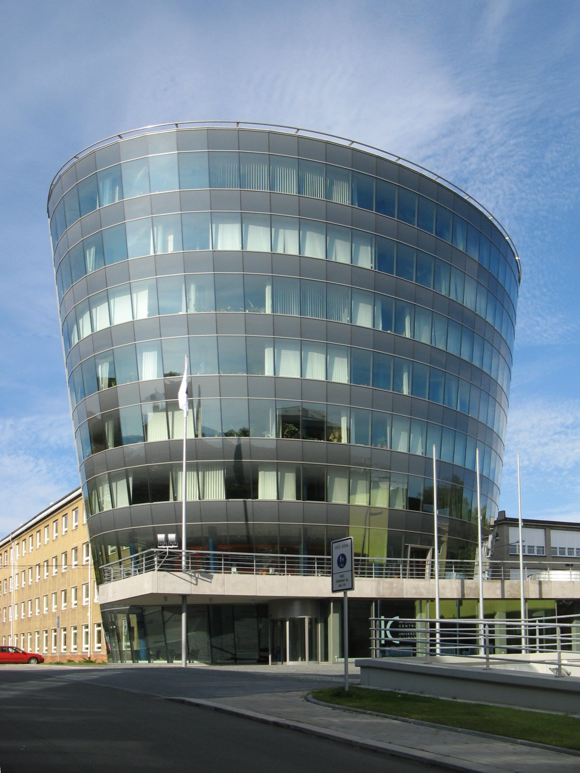 Budova rektorátu TU v Liberci, Liberec I-Staré Město, Studentská 1402/2, 1292/4.